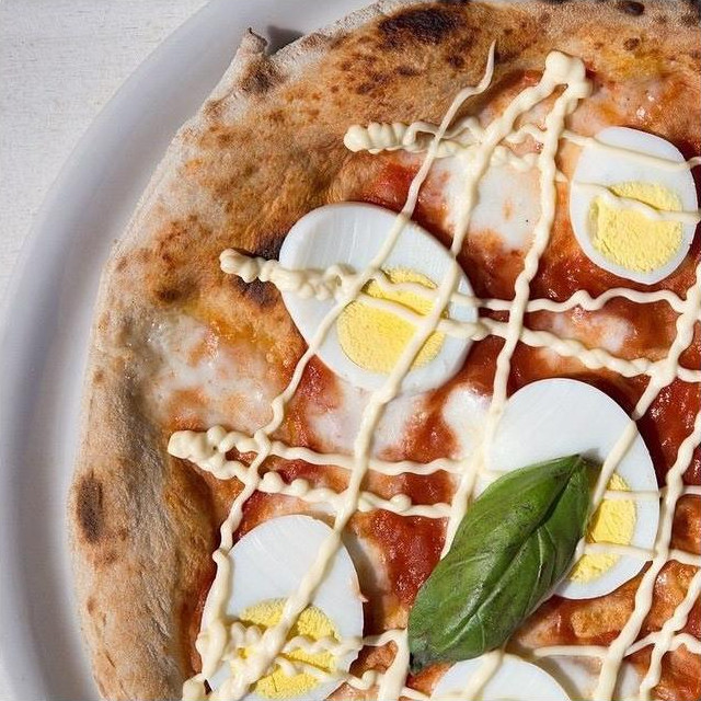 La forma più tradizionale della Pizza Rossini